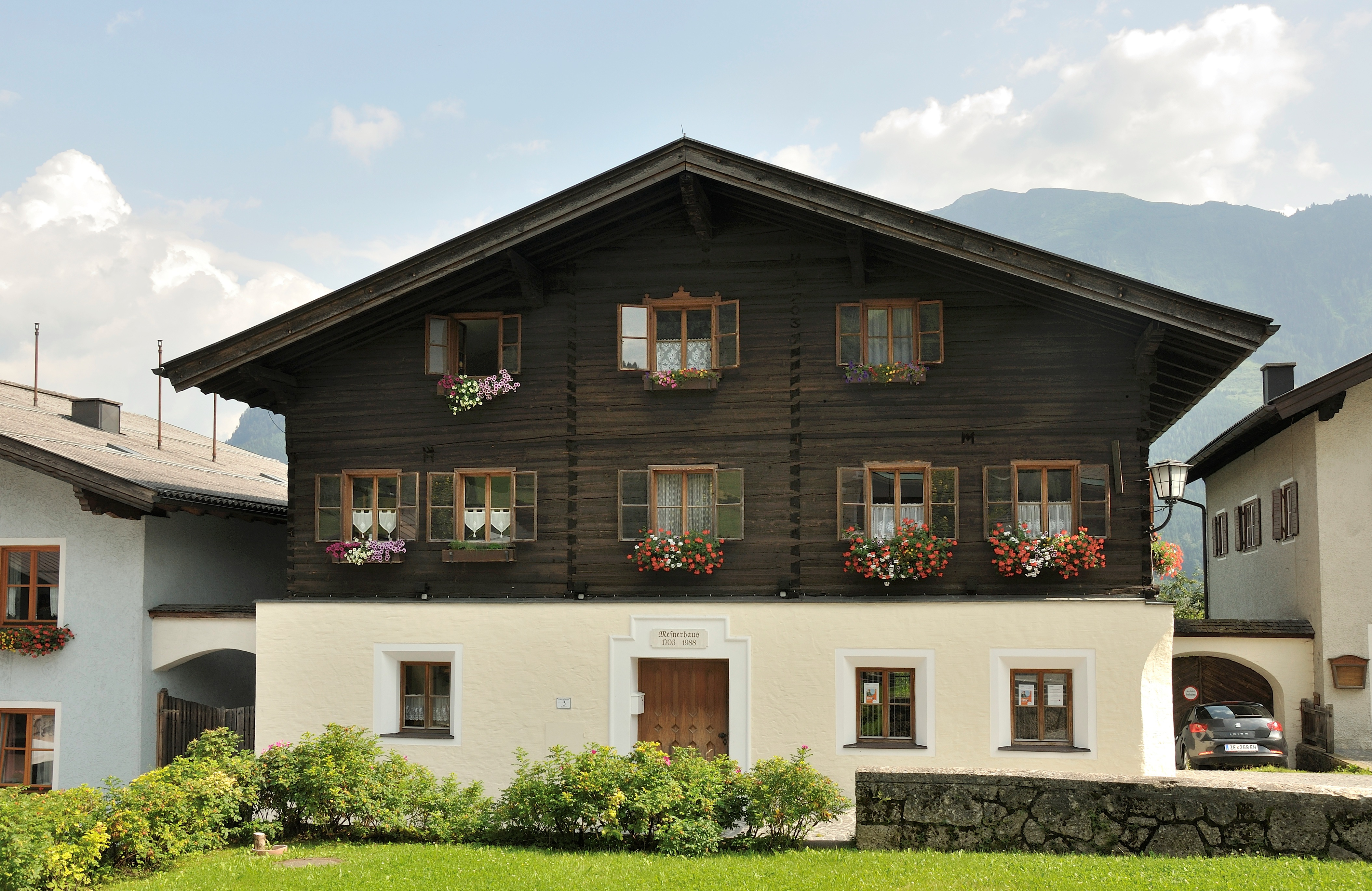 Mesnerhaus